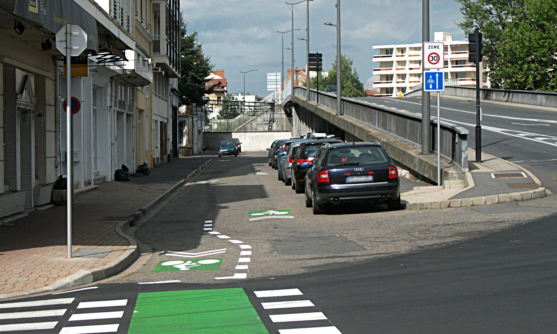 L'avenue de Gramont annexe. Depuis 2011, une traversée cyclable existe, l'avenue est classée en zone 30 mais reste à sens unique, sauf pour les cyclistes.Panneaux : Lacroix signalisation, 2011, Classe 1 B30 : Entrée de zone 30 C24a : Condition particulière de circulation sur la route suivie